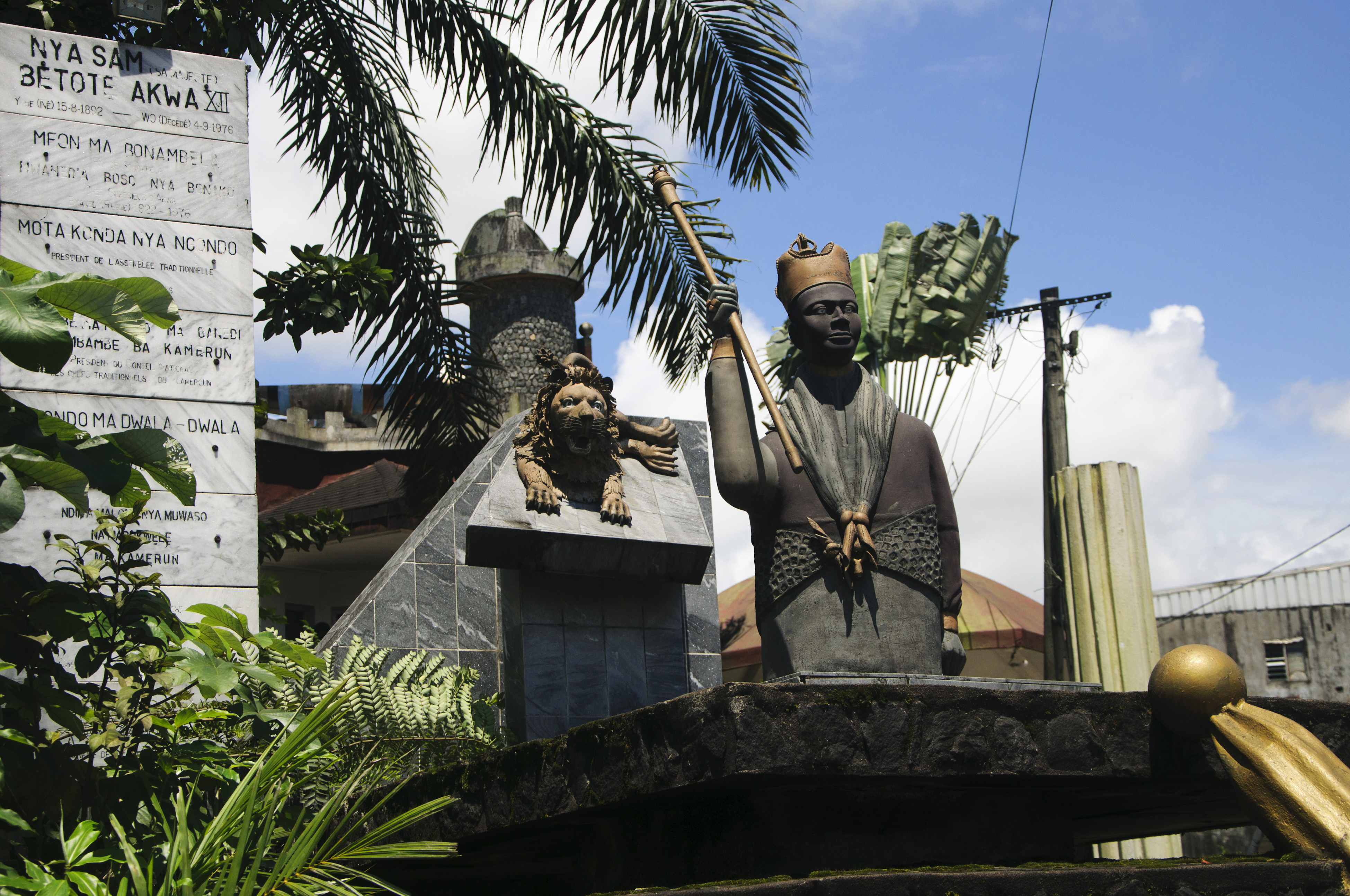 Monument des roi d'akwa Douala Akwa